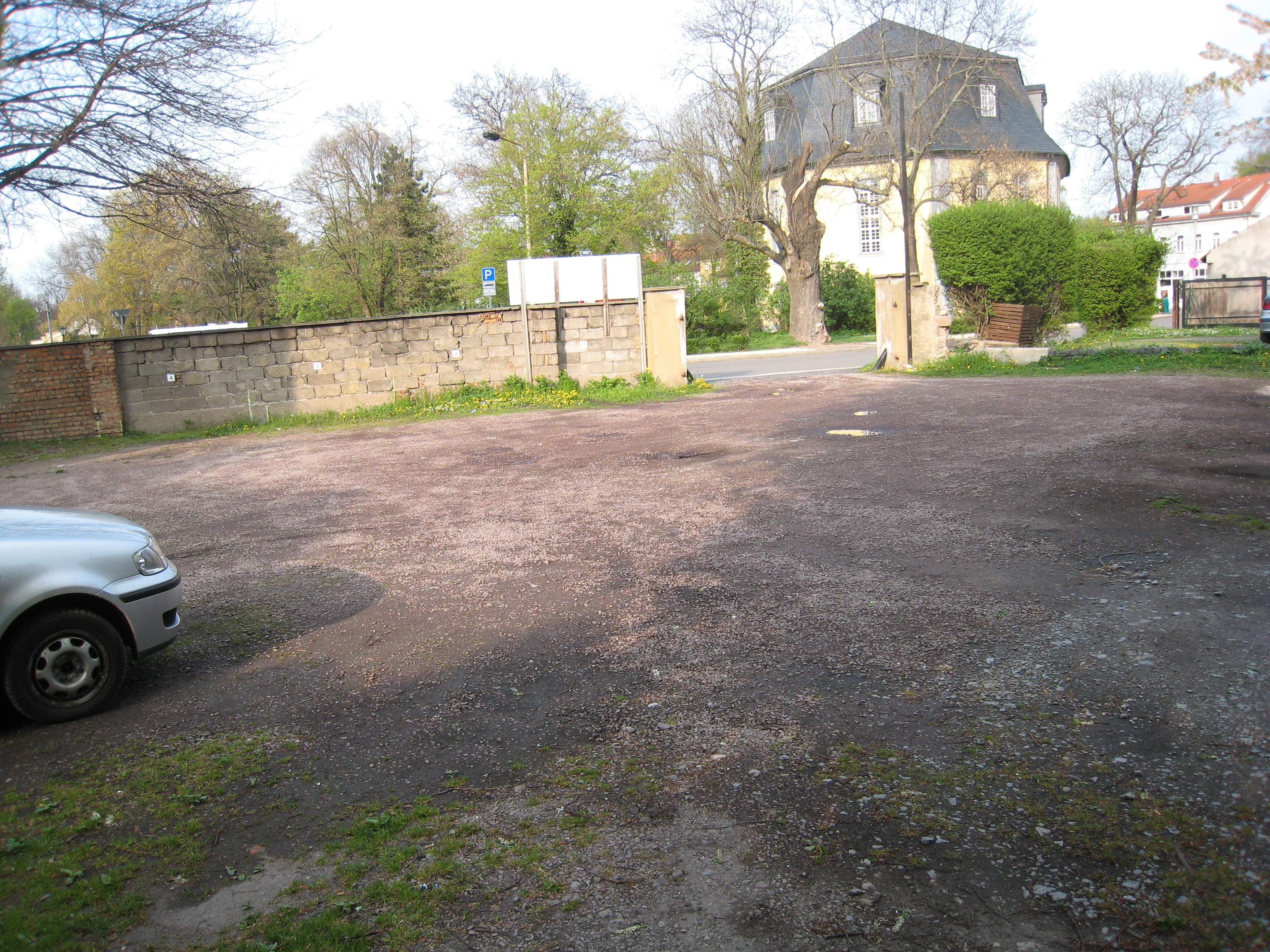 Standort der Synagoge von Arnstadt bis 1938, im Hintergrund die Himmelfahrtskirche.